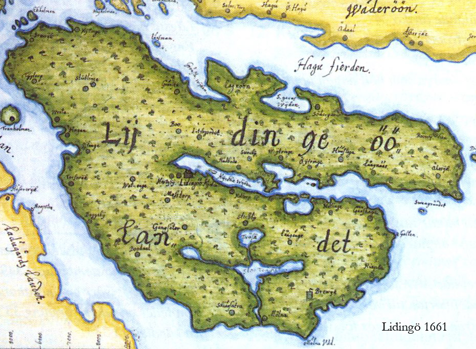 Map over Lidingö, Sweden painted by Peder Mehnlöös in november 1661.